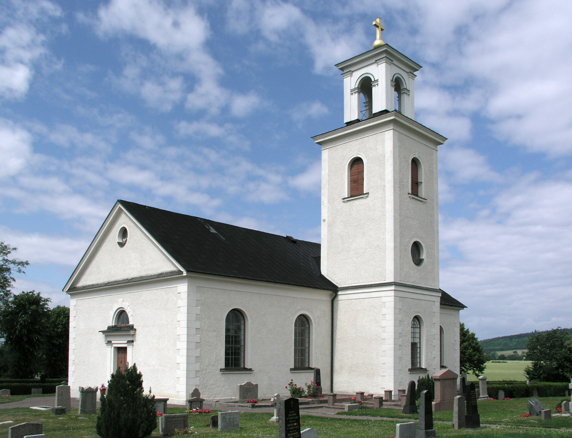 Västra Tollstads kyrka, Ödeshög, Linköpings stift, Östergötland, Sverige. Vy.